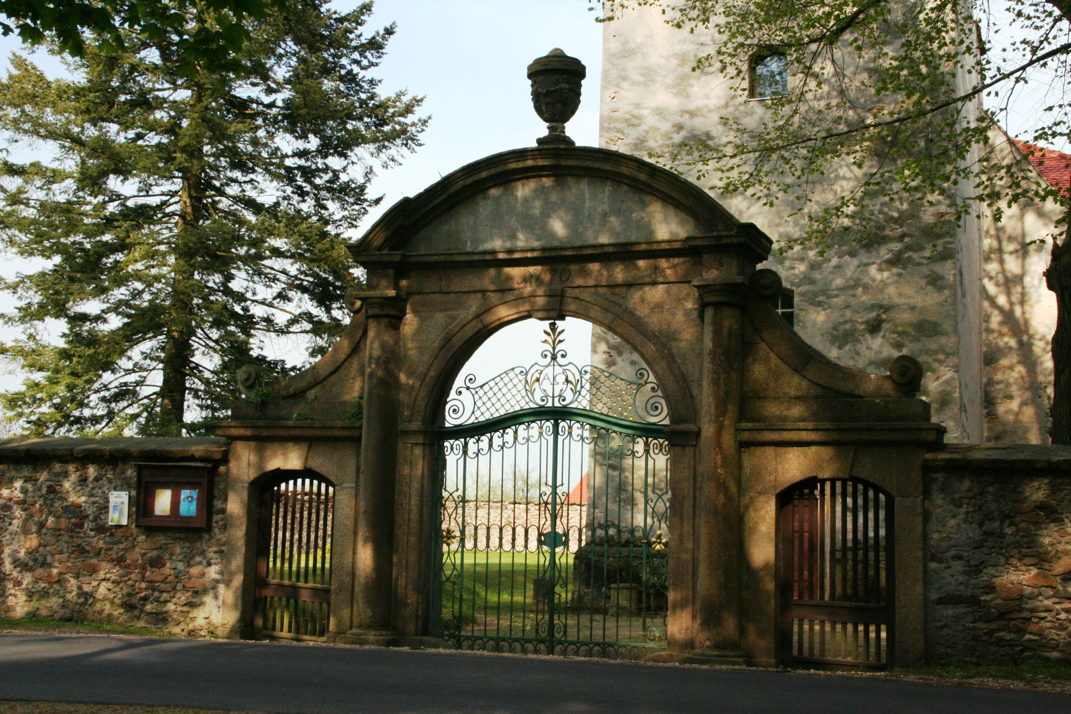 Granitportal von 1776, die Holztüren sind von nach 1945.